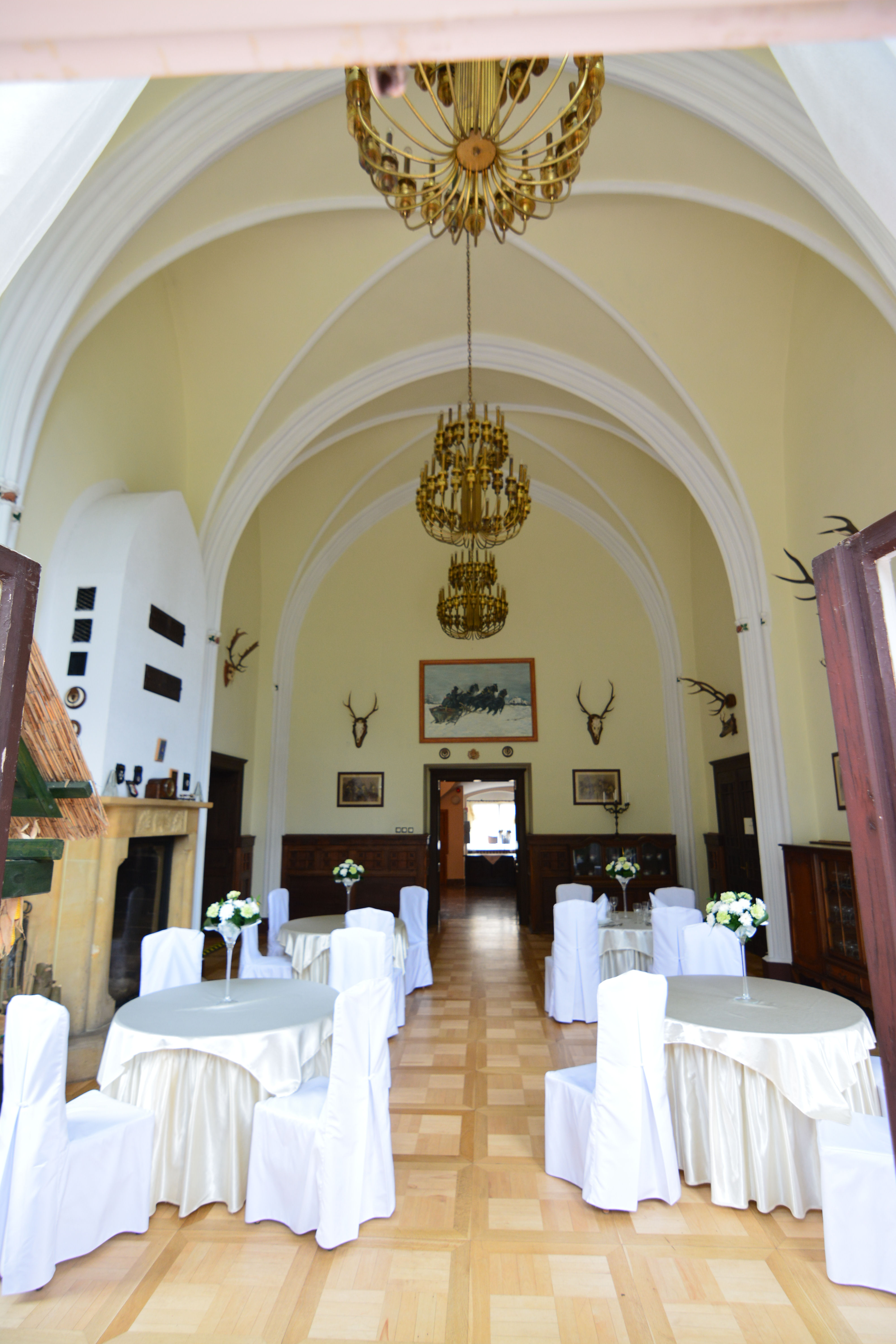 Pęzino - zamek, XIV, 1 poł. XVI, 1600, XIX